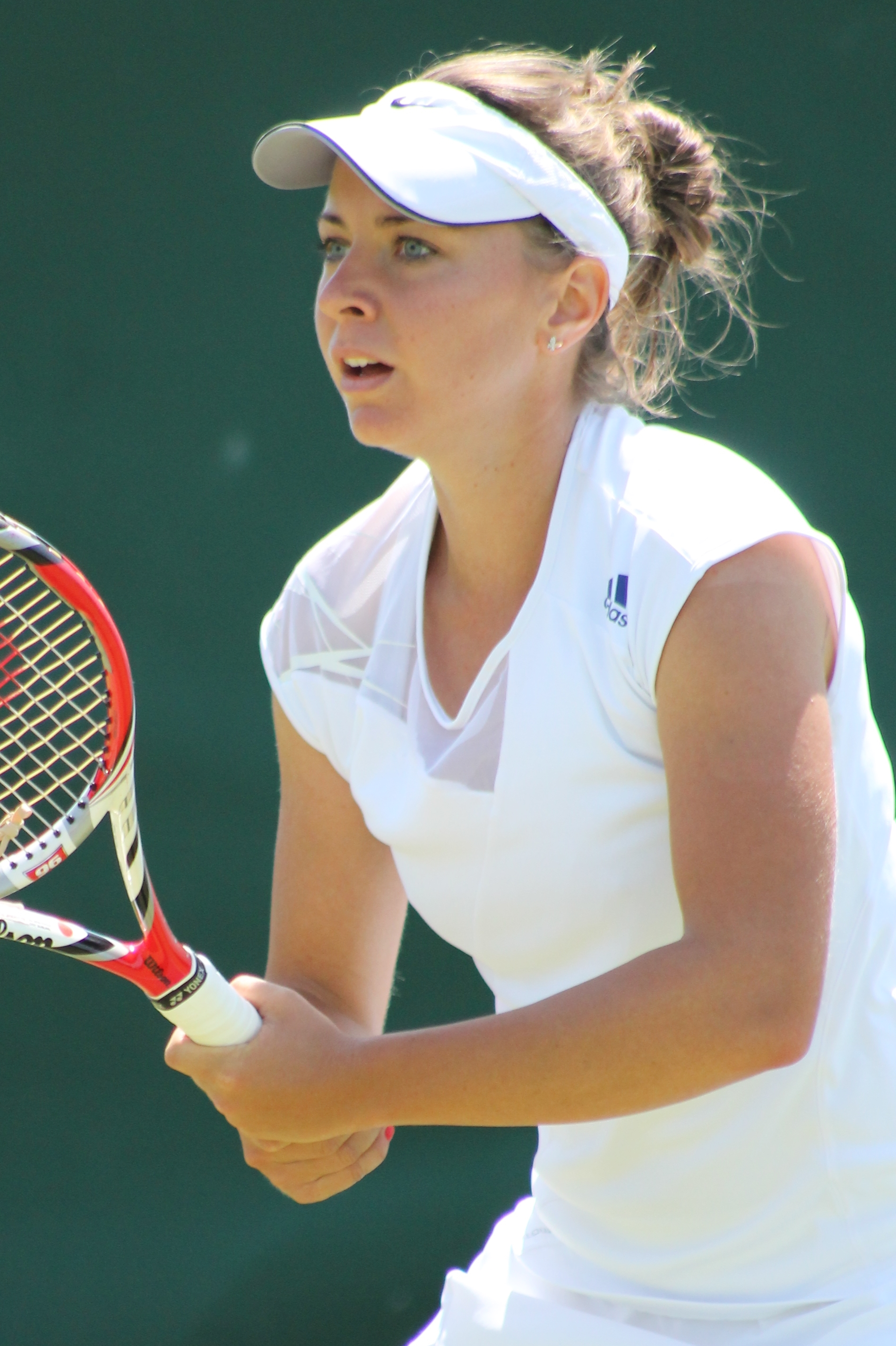 Kristína Kučová WMQ14 (18)